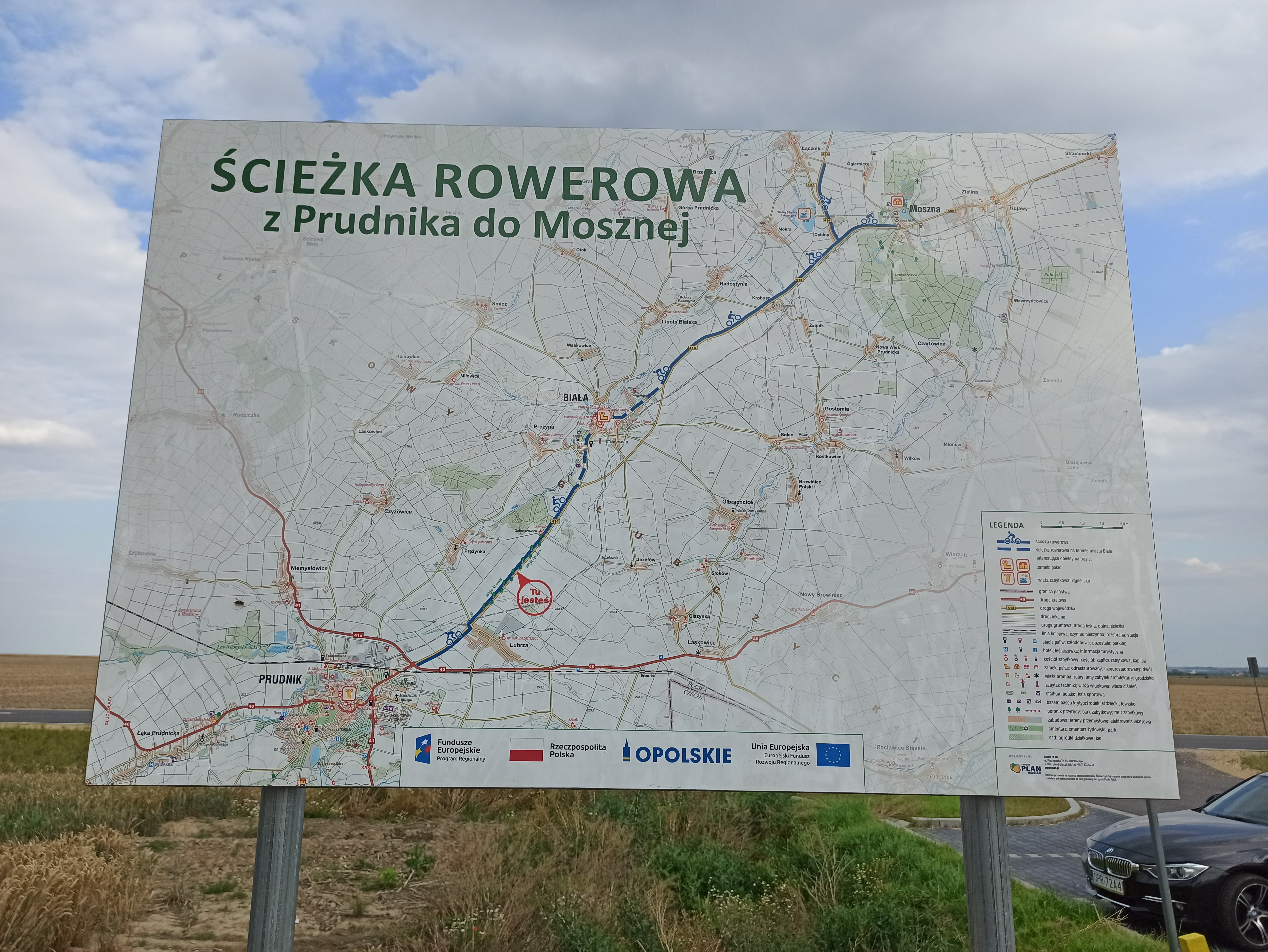 Tablica informacyjna Ścieżka Rowerowa z Prudnika do Mosznej w pobliżu miejscowości Dobroszewice.